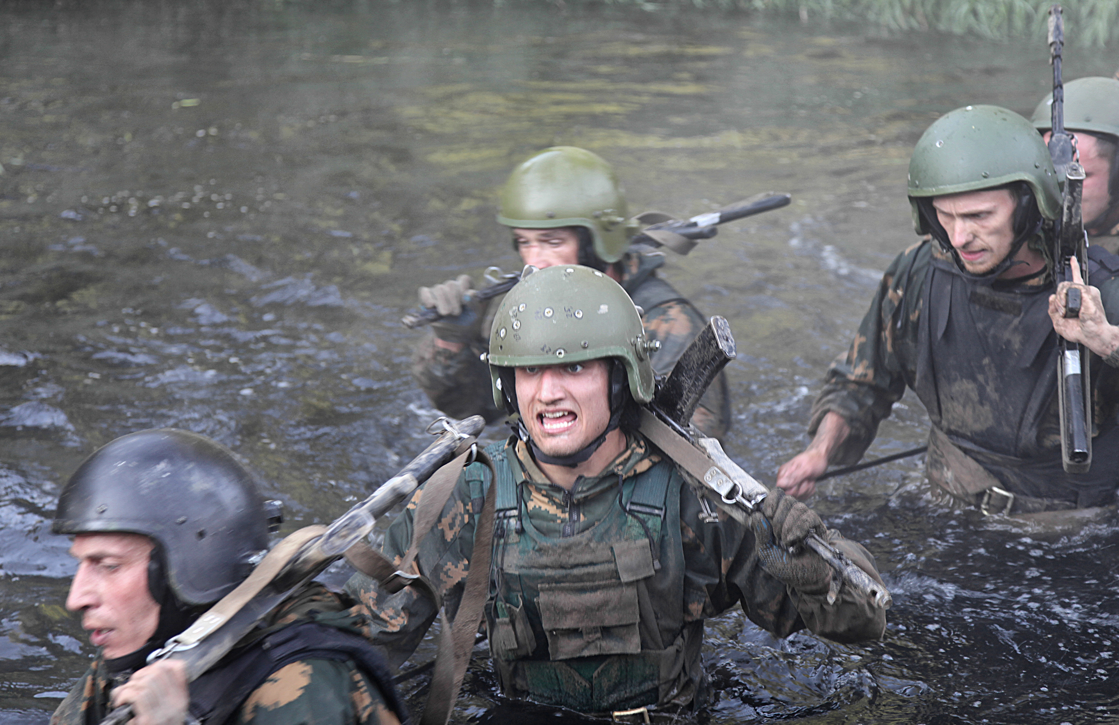 Преодоление водной преграды в ходе испытаний на право ношение крапового берета.